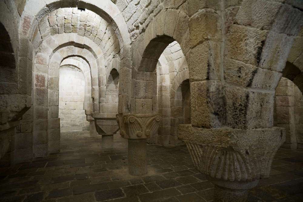 unidentified Spain